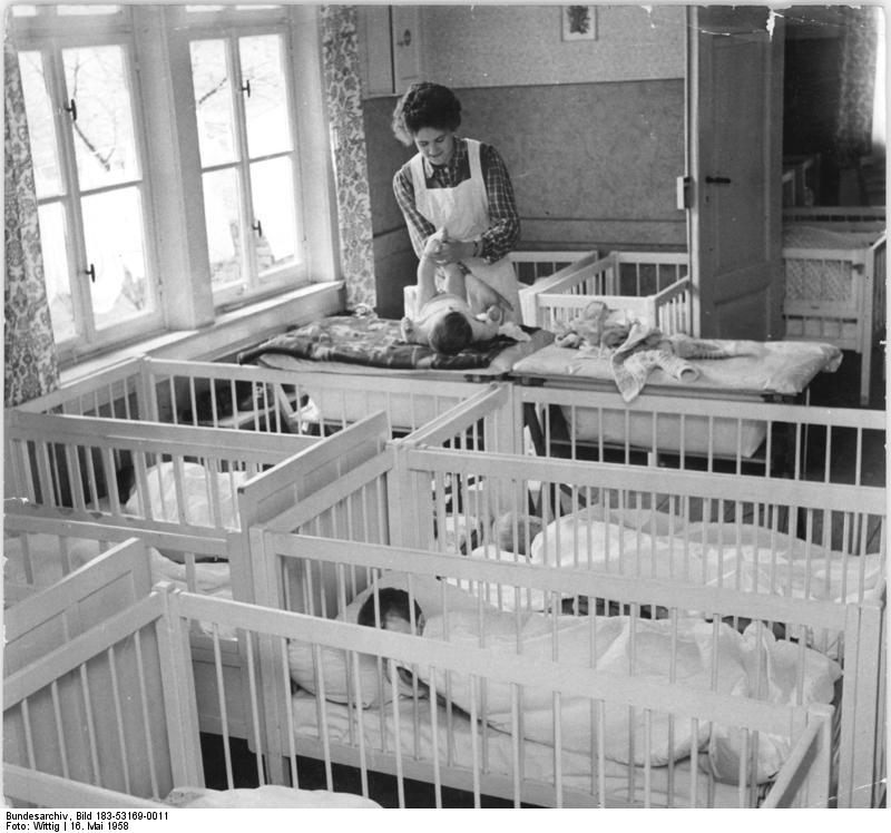 Ingersleben, Blick in die Kinderkrippe Zentralbild Wittig 16.5.1958 Ein Dorf in unserer Republik Ein Dorf wie viele andere ist die kleine Gemeinde Ingersleben-Landkreis Erfurt. Von ihren 1800 Einwohnern sind ca. 50% Bauern. Die landwirtschaftliche Nutzfläche des Dorfes beträgt ca. 900 ha. 250 ha werden von der LPG bestellt. Nach 1945 hat sich das Dorfbild grundlegend verändert und so entstanden unter Mithilfe der Dorfbewohner 1 Kindergarten, 1 Kinderkrippe, 1 Sportplatz, 1 Gemeindeschwesterstation, 1 Jugendzimmer. Die gemeindeeignen Gebäude, die 1945 vom ehemaligen Rittergut in sehr schlechtem Zustand übernommen werden, sind instand gesetzt worden. Dem Bürgermeister der Gemeinde Otto Kein, ist von Beruf Maurer. 1929 gründete er den Kommunistischen Jugendverband in Ingersleben und war Vorsitzender der KPD-Ortsgruppe. Nach dem Reichstagsbrand im Jahre 1933 wurde er von den Faschisten verhaftet. Nach seiner Freilassung arbeitete er wieder in seinem erlernten Beruf. Getragen vom Vertrauen der Gemeinde bekleidet er seit 1945 das Amt des Bürgermeisters. Ubu: Unbesorgt können die werktätigen Mütter ihrer Arbeit nachgehen, denn in der Kinderkrippe der Gemeinde sind ihre Kleinen gut aufgehoben. Die Unterbringung, Verpflegung und Wäschewaschen ist kostenlos.